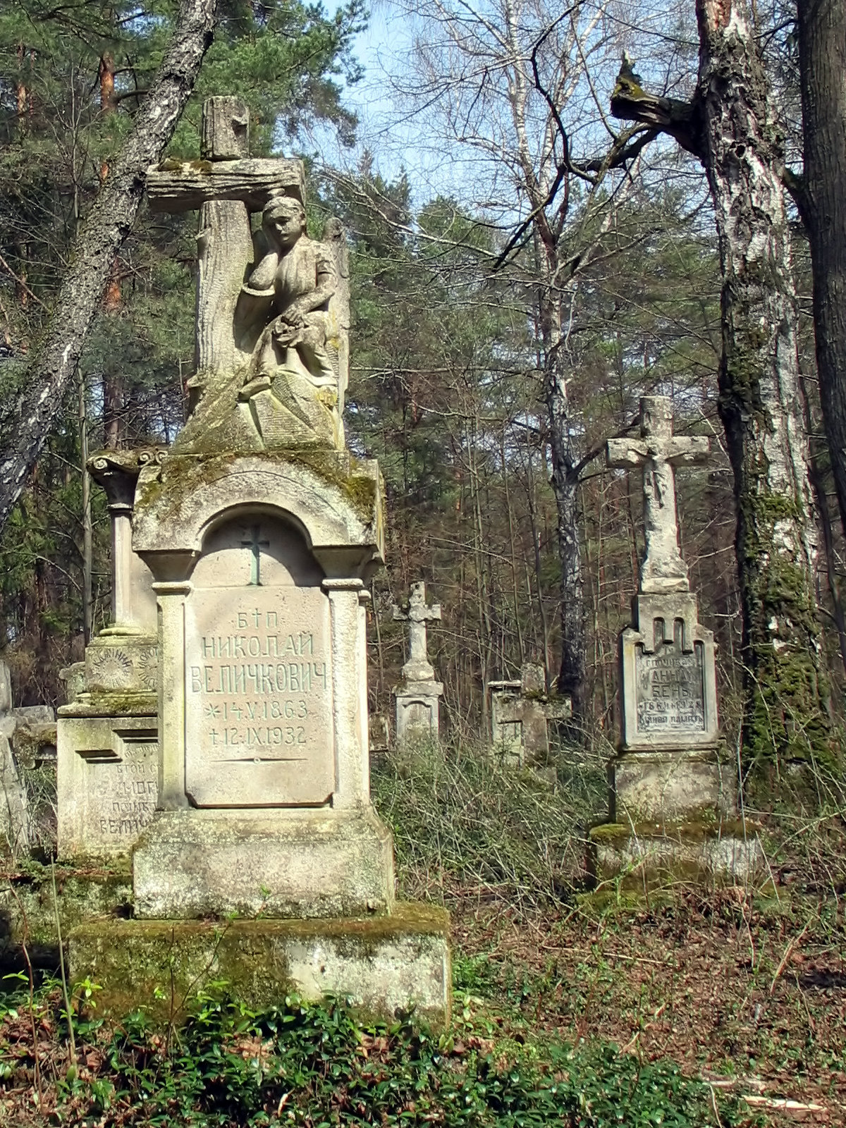 Stare Brusno (Polska) - nagrobek z 1942 r.